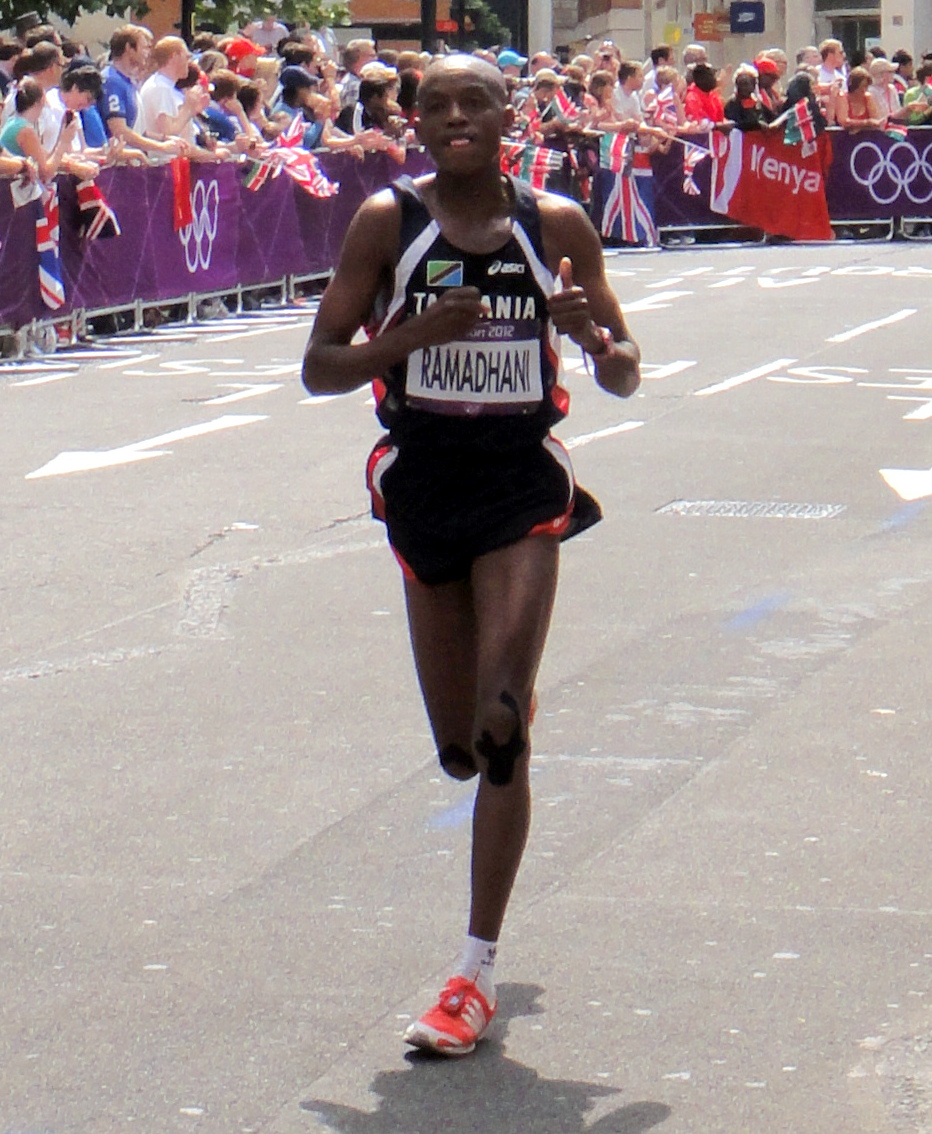 Samson Ramadhani (Tanzania) - London 2012 Men's Marathon